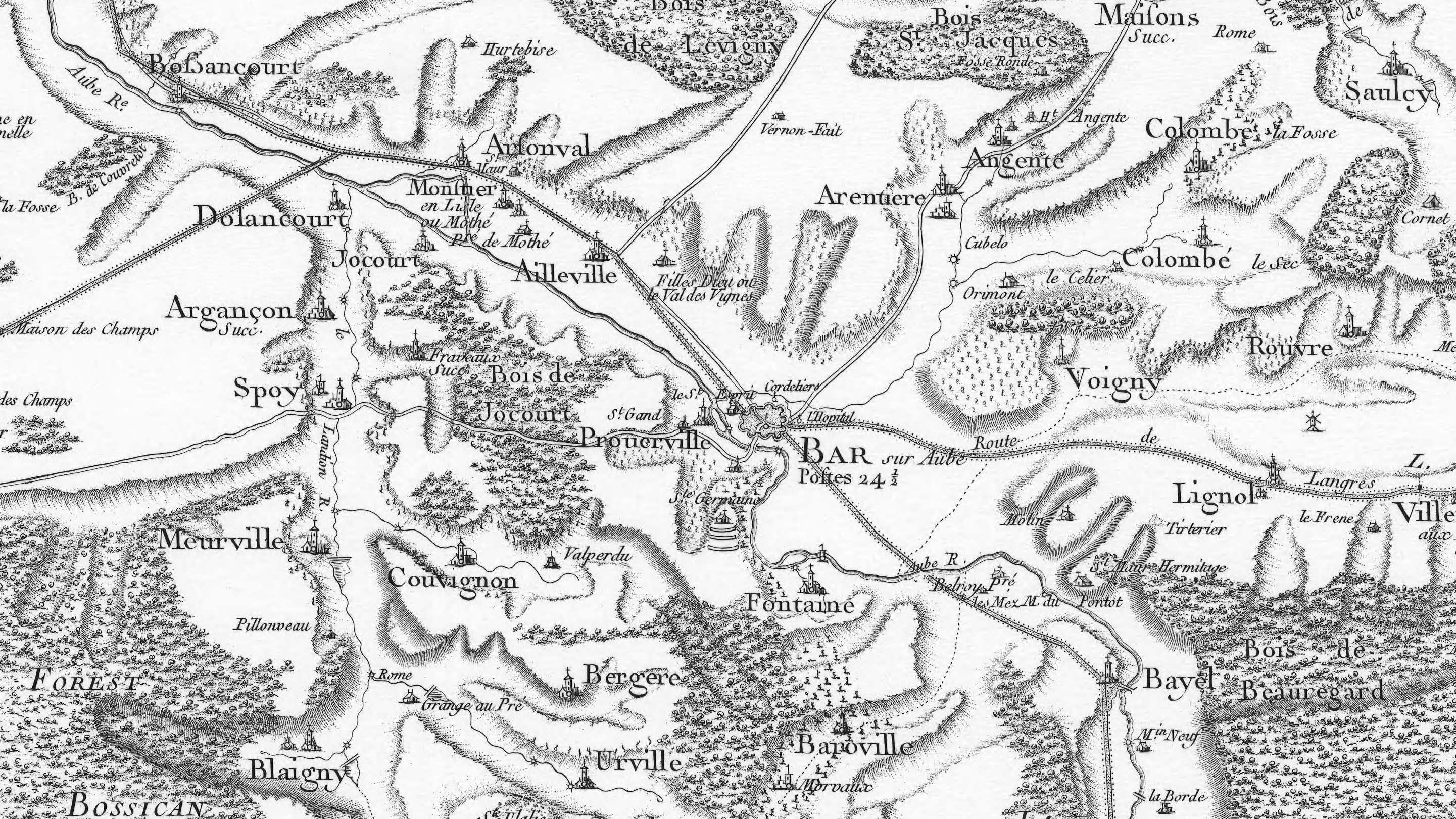 Bar-sur-Aube et alentours - Détail de la carte de Cassini